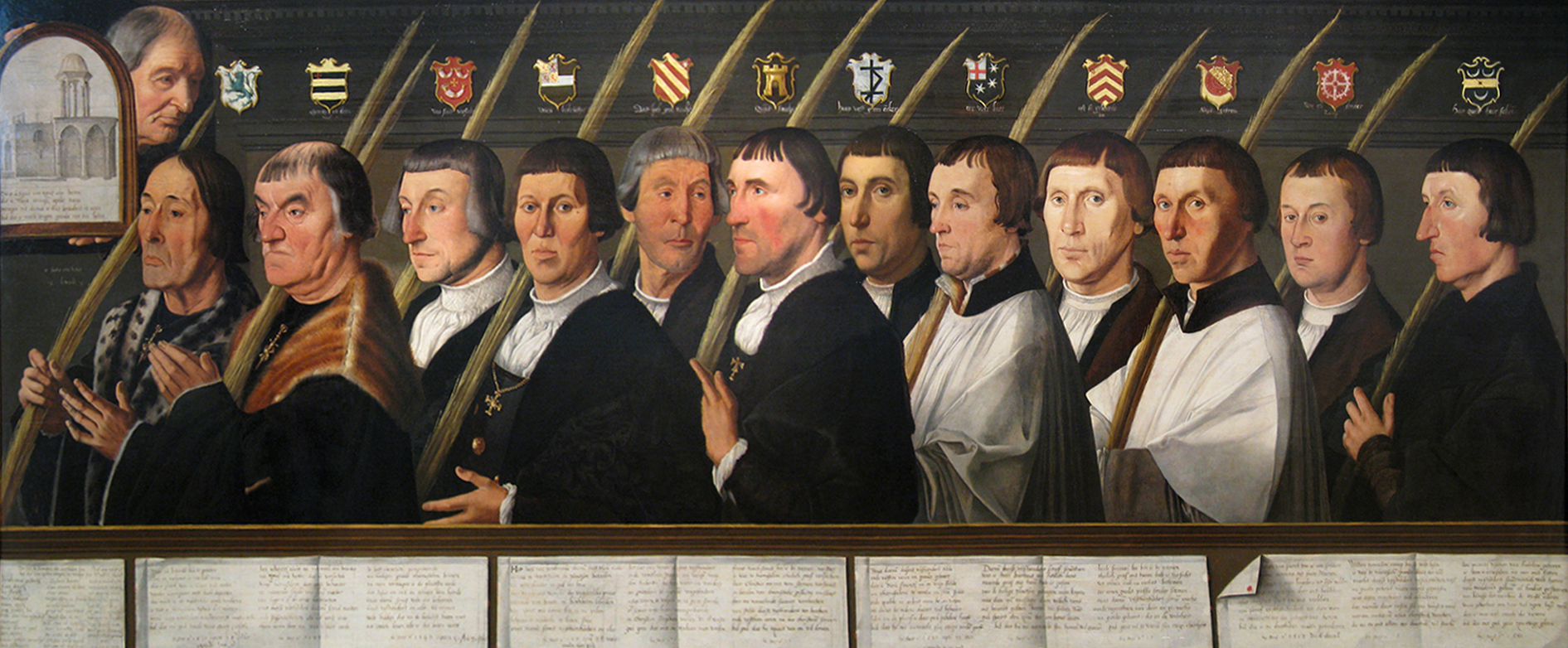 Jan van Scorel – Groepsportret van Jeruzalemvaarders Panorama, gemaakt van drie foto's van legalizefreedom van een schilderij van Jan van Scorel in het Frans Hals museum in Haarlem.